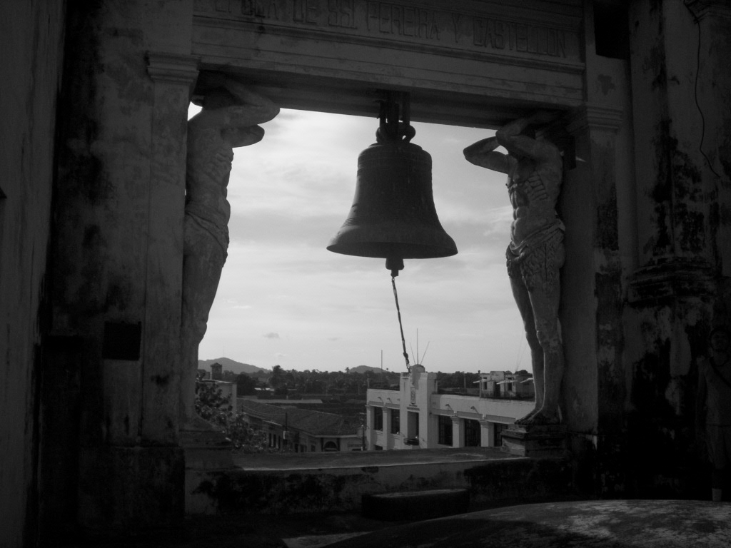 Catedral de León, Nicaragua, Blanco y negro